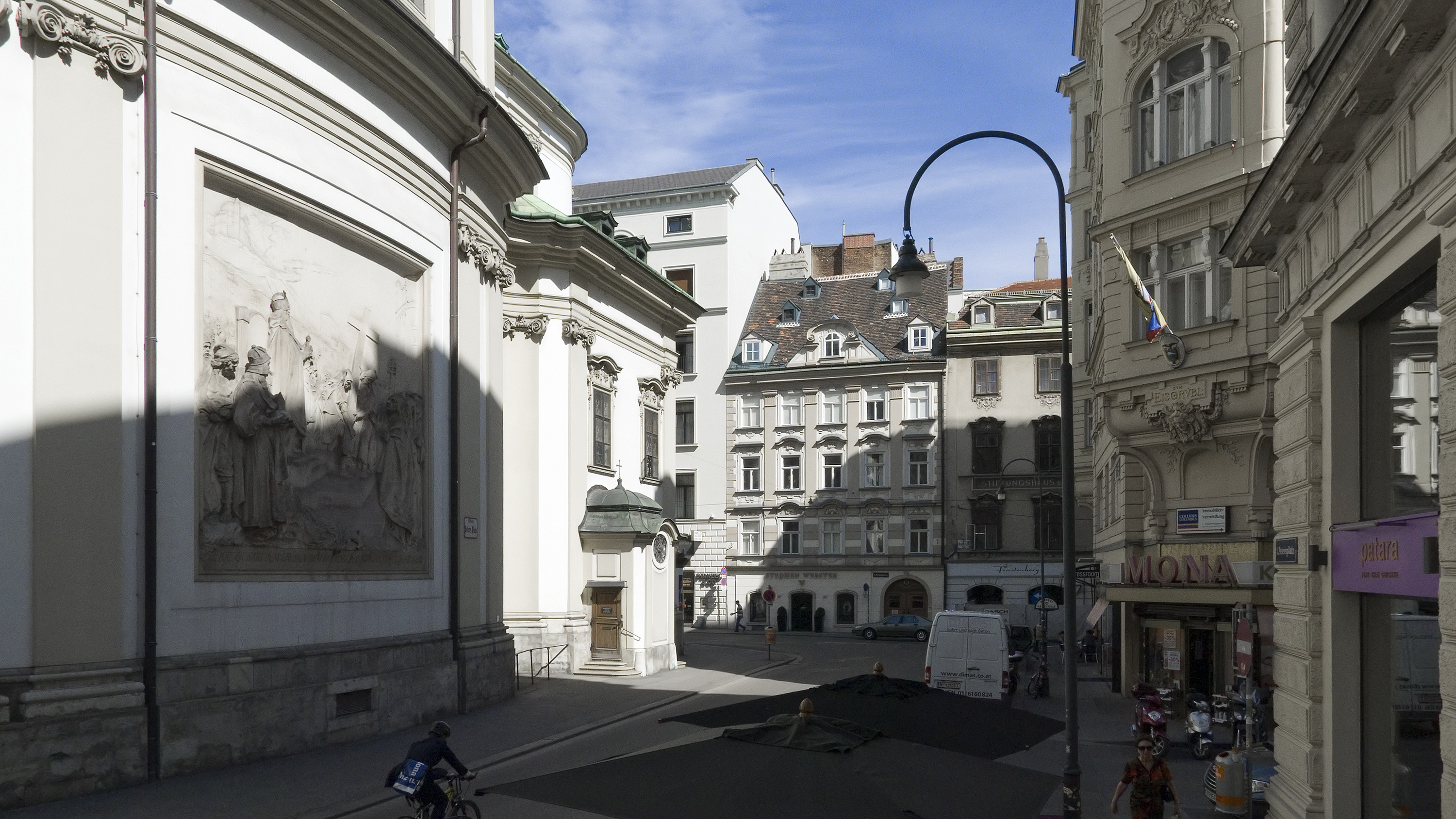 Petersplatz in Wien 1 bei der Goldschmiedgasse Richtung Nordosten